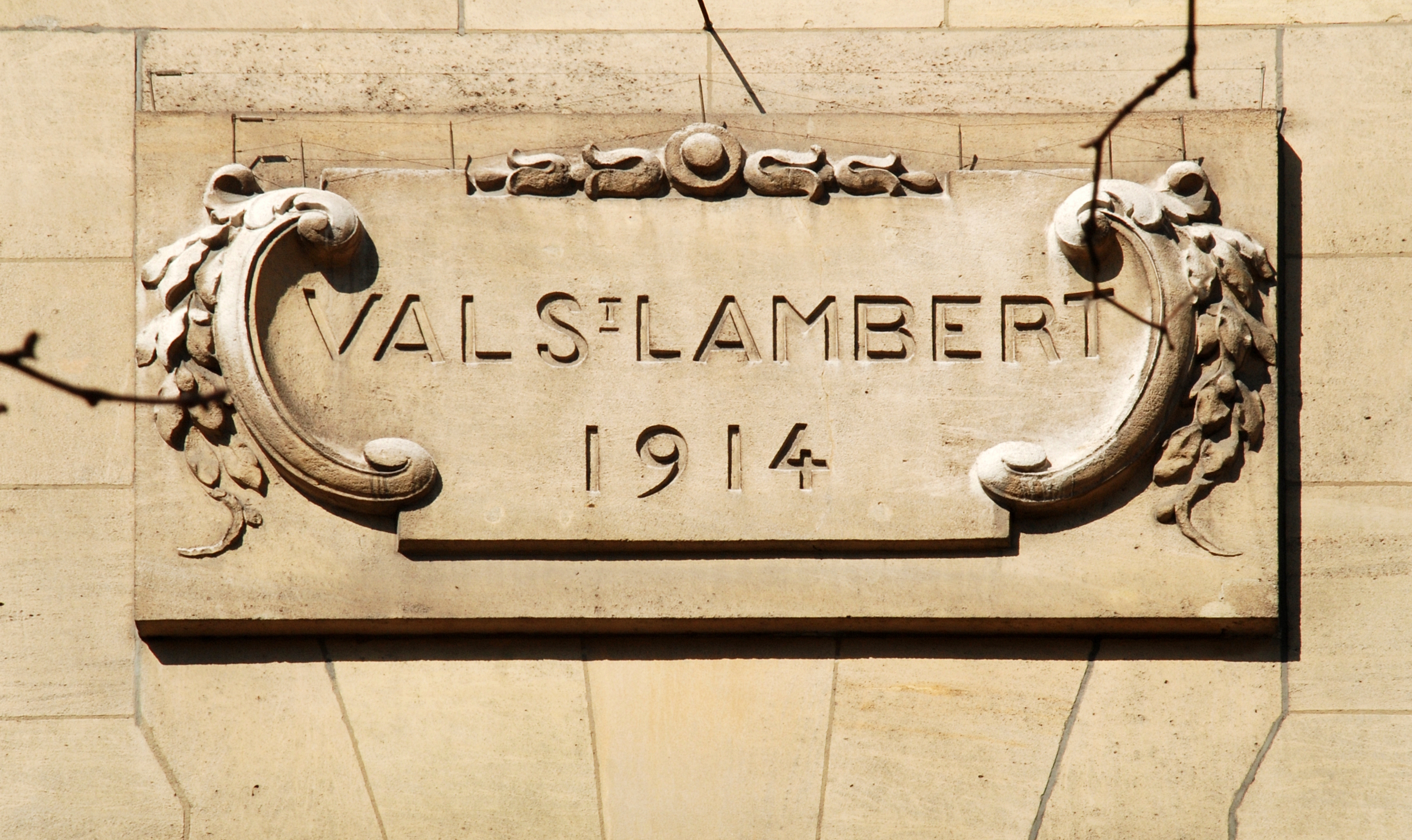 Belgique - Bruxelles - Ancien siège des cristalleries du Val-Saint-Lambert